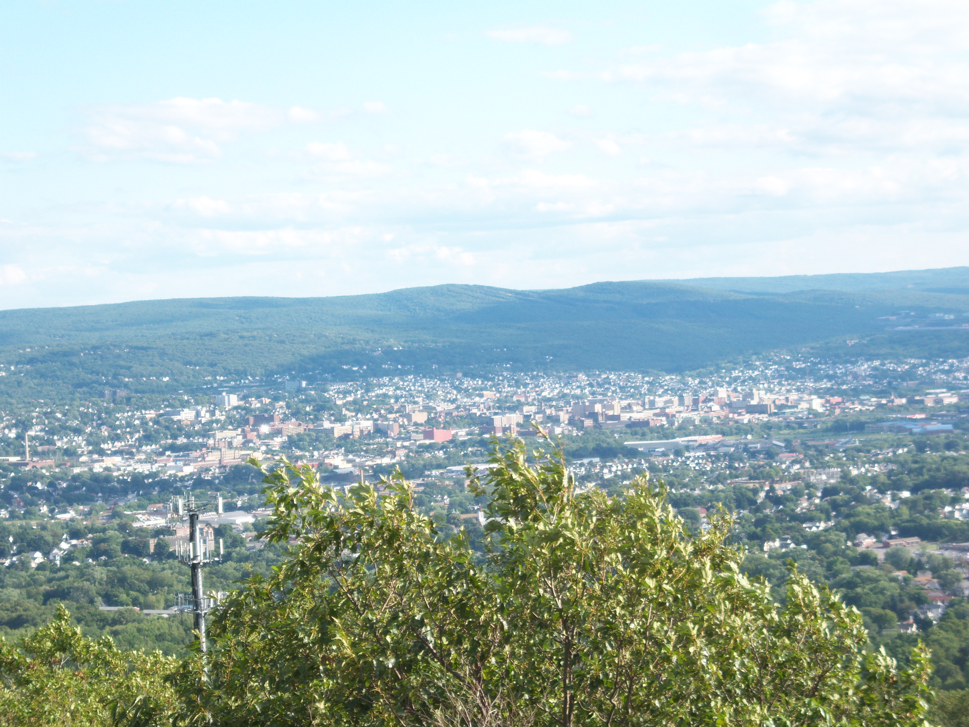 Mons Campanus (Angelice: Bell Mountain) est iugum collium silvanorum prope Scrantone. Haec pictura in anno 2010 sumebatur.